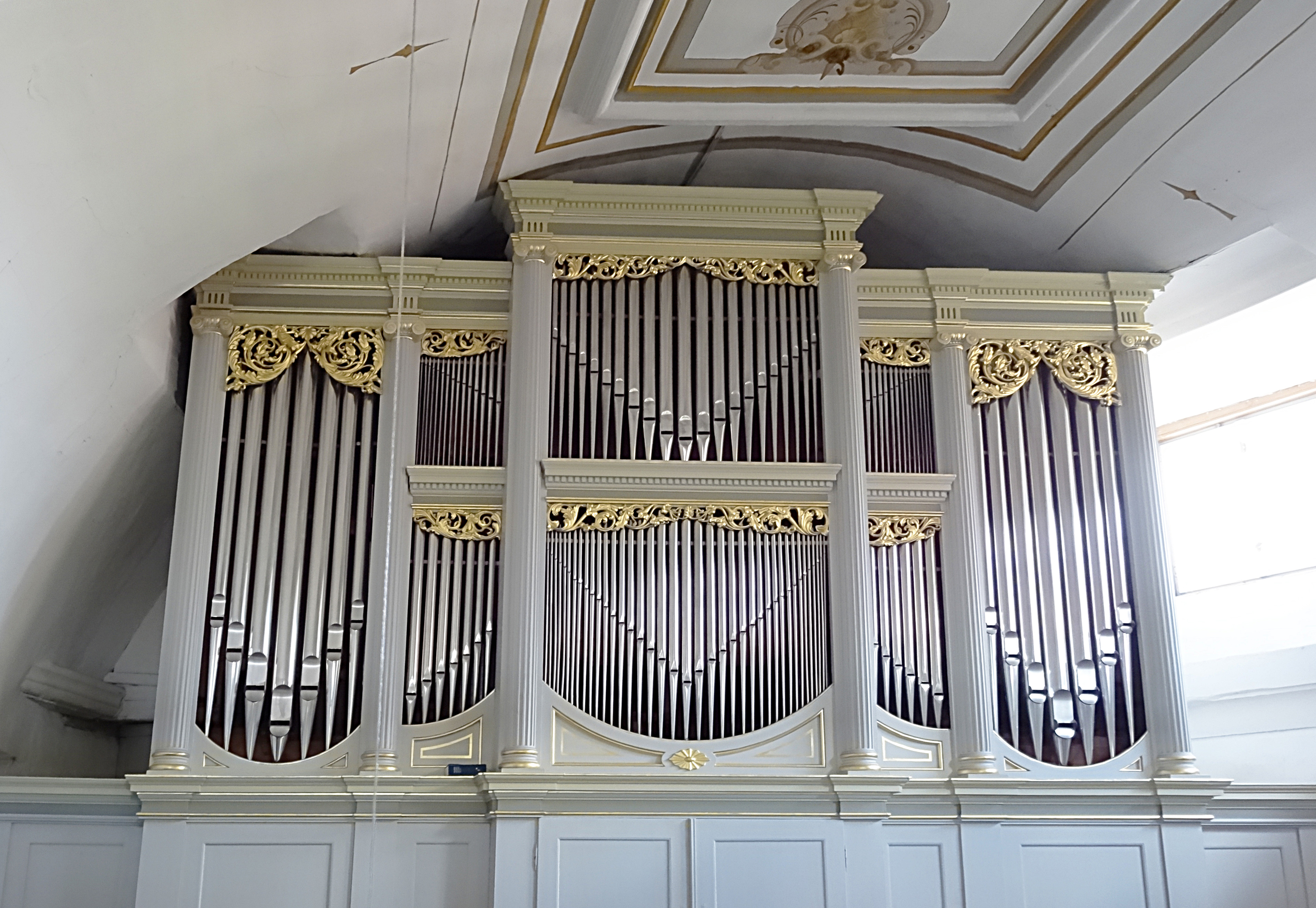 Orgel der Kirche Sankt Walpurgis in Apfelstädt (Thüringen) von Christian Friedrich Knauf (1833, IIP/31) [1]